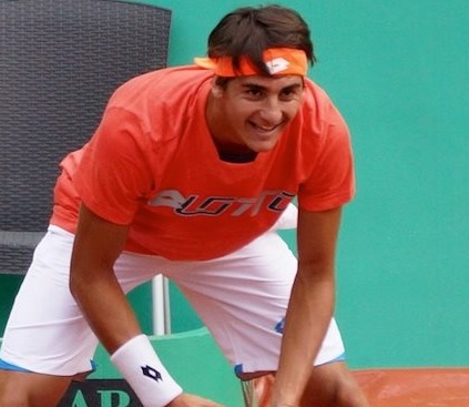 Manu jugando en Dusseldorf, Alemania